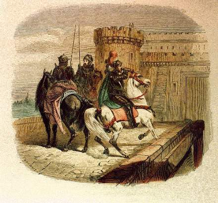 Ilustracja do "Grażyny" A. Mickiewicza